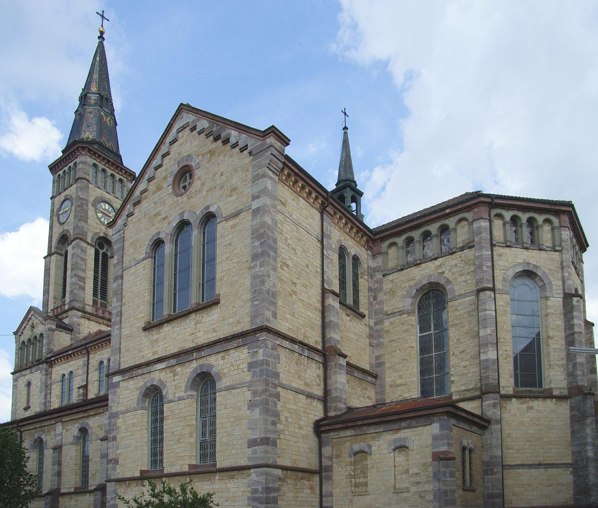 Dieses Bild zeigt die Stadtkirche "Unsere Liebe Frau vom Berge Kamel" in Bräunlingen.